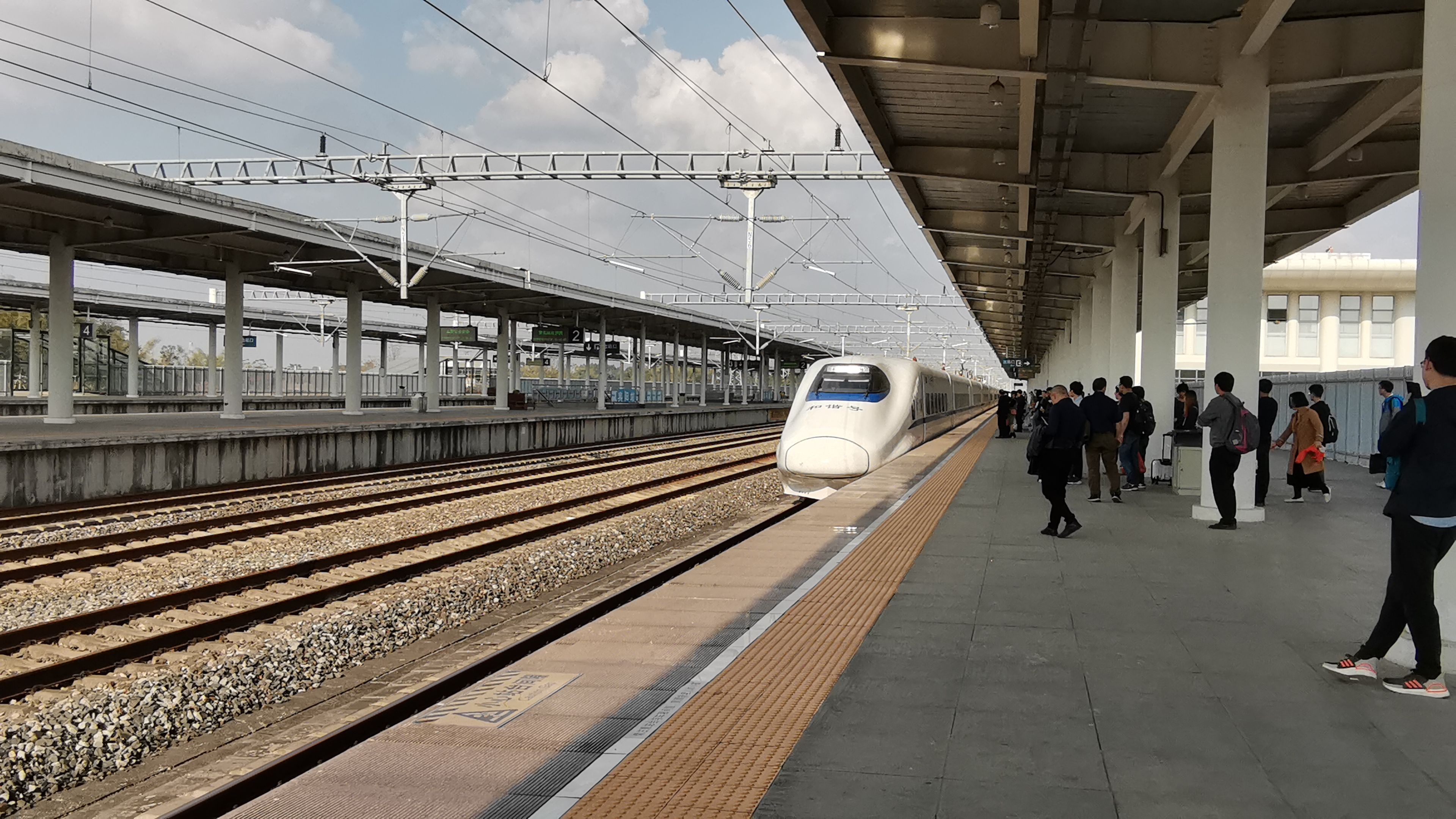 高铁宾阳站月台